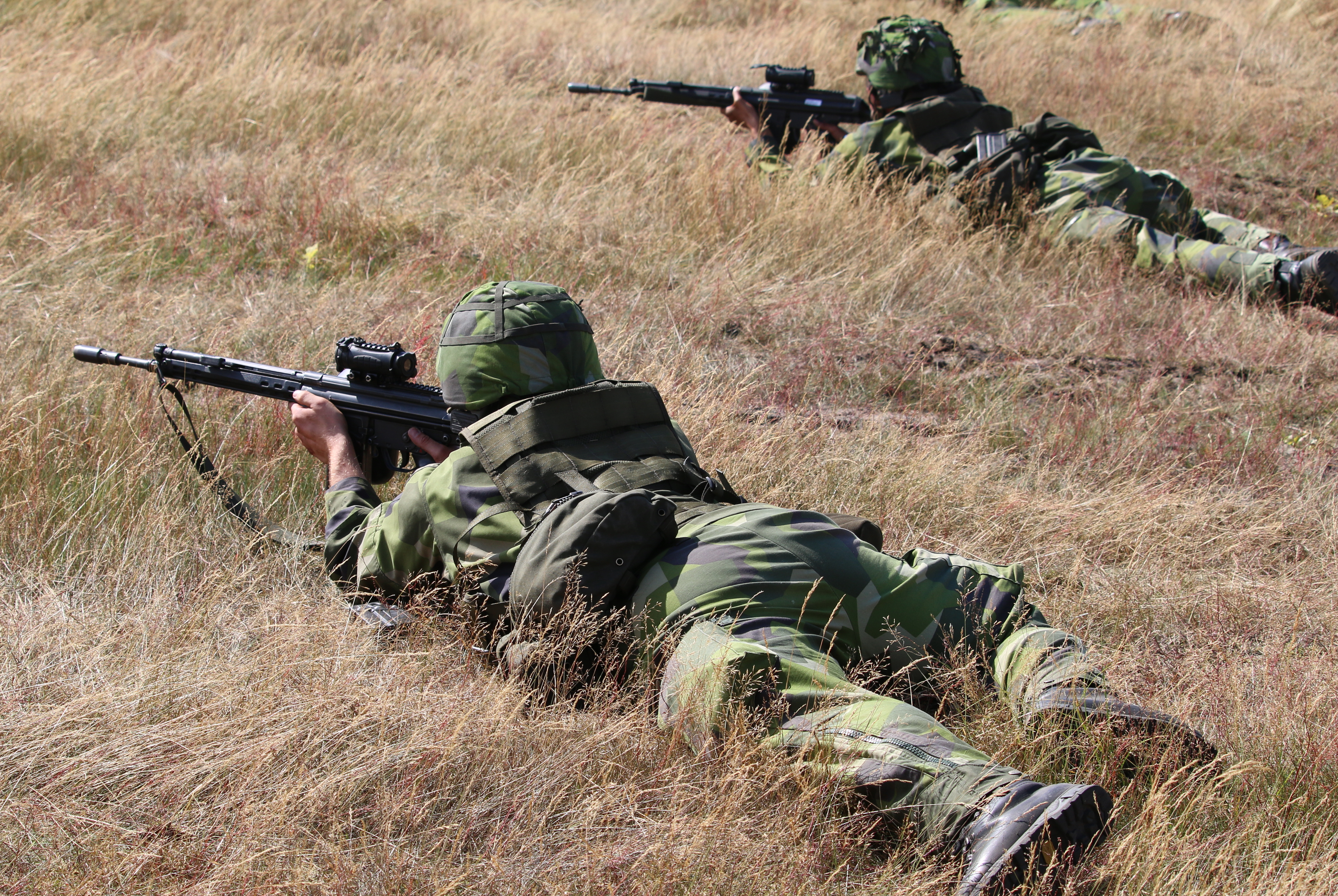 Skyttesoldater från Hemvärnet Revinge 2015